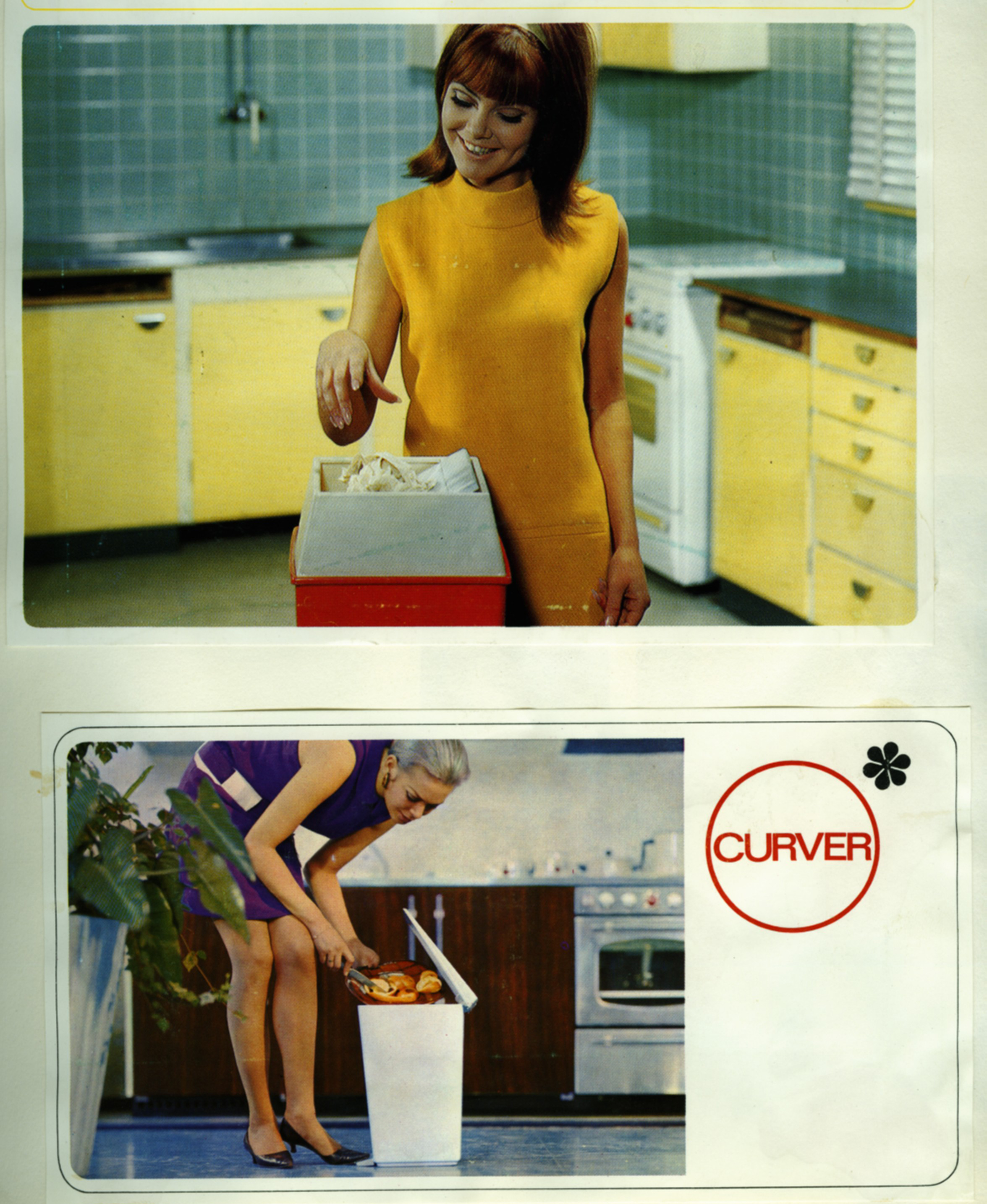 Foto van een Curver Pedaal emmer in gebruik